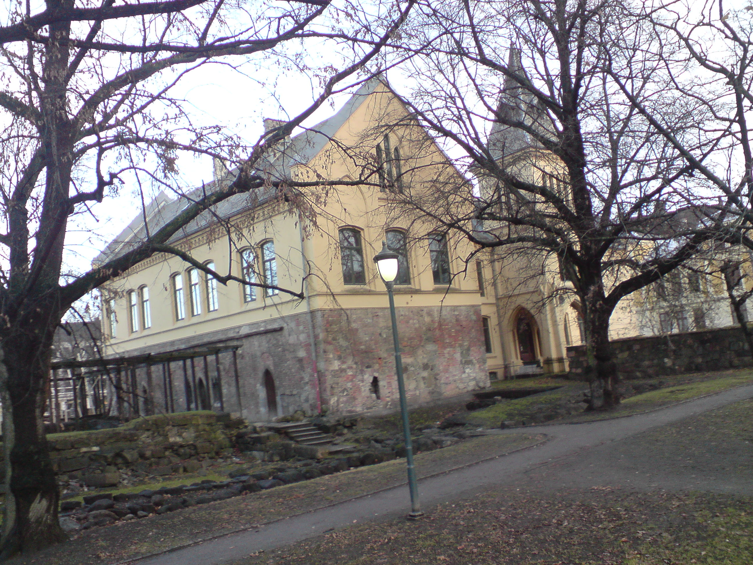 Oslo bispegård med rester av Olavsklosteret som kjeller